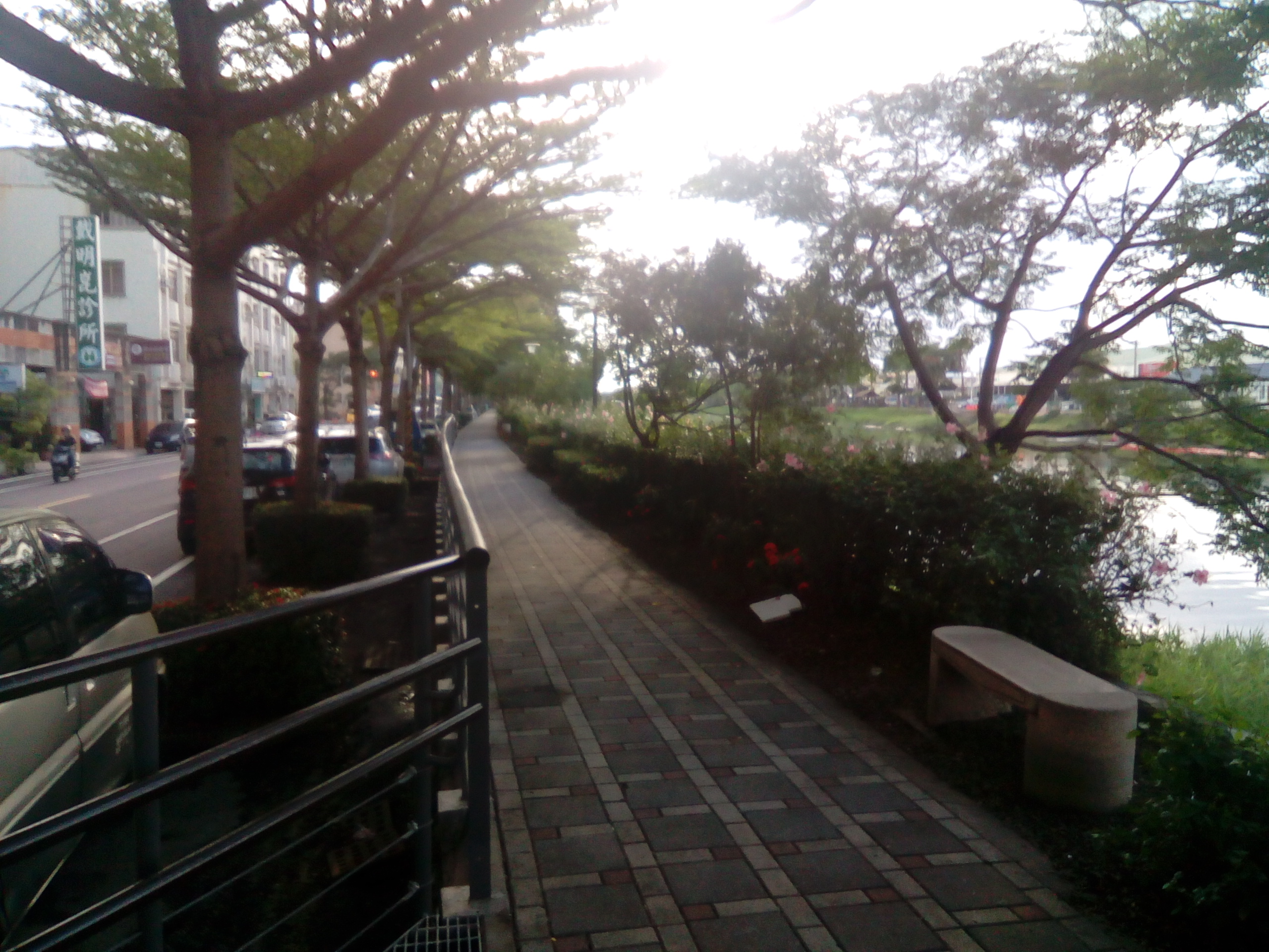 位於郡安路旁